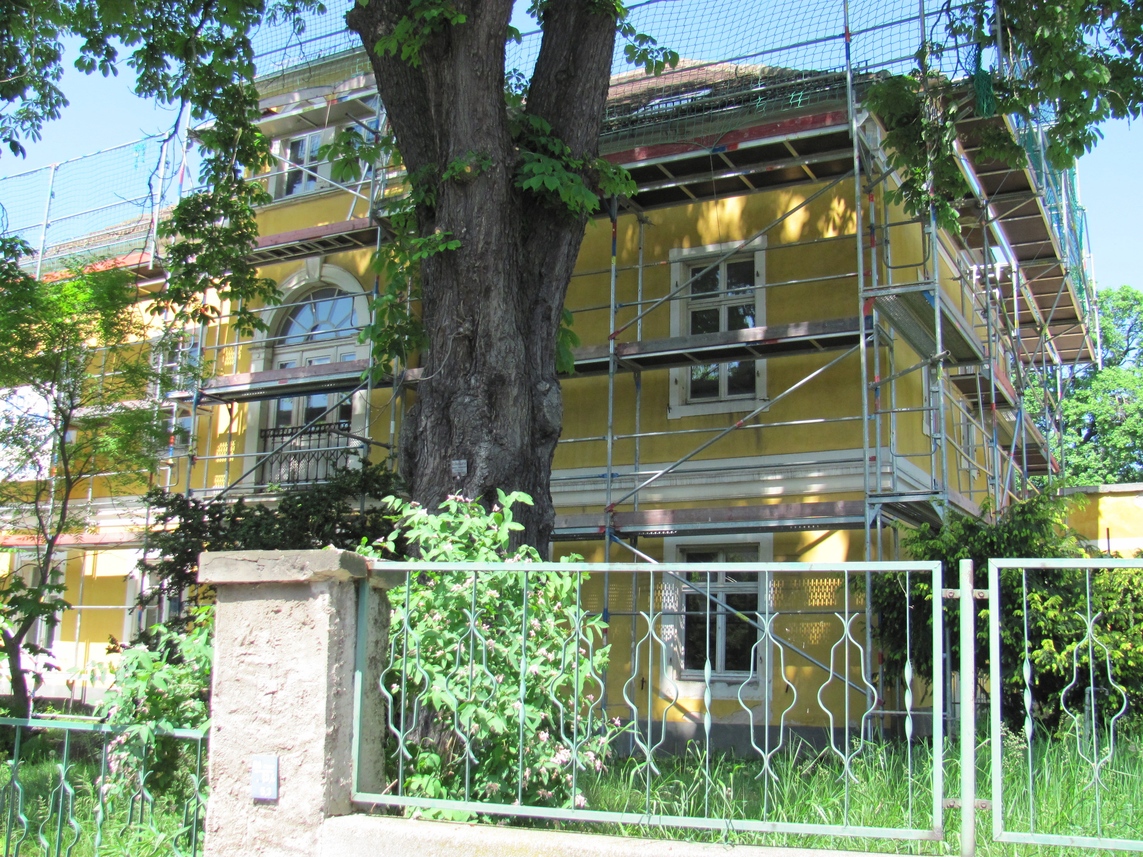 Radebeul Villa Coelestine von Stechow